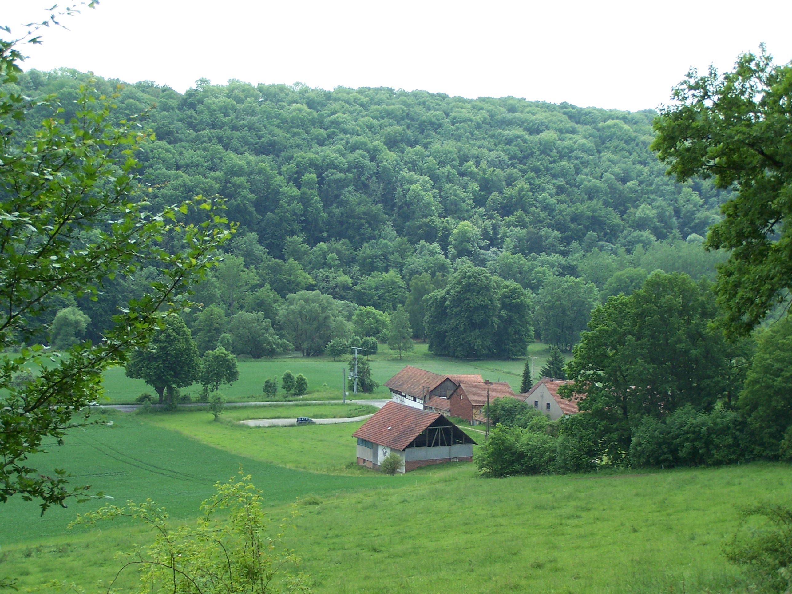 Blick von Norden über Freitagszella zum Lienig (NSG) bei Mihla.